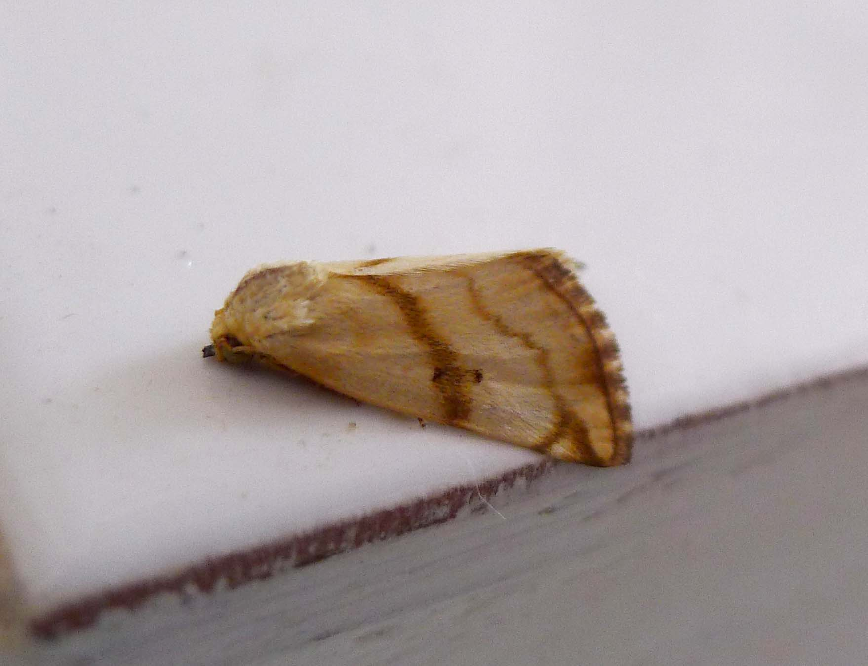 Jimena, Andalucia, Spain